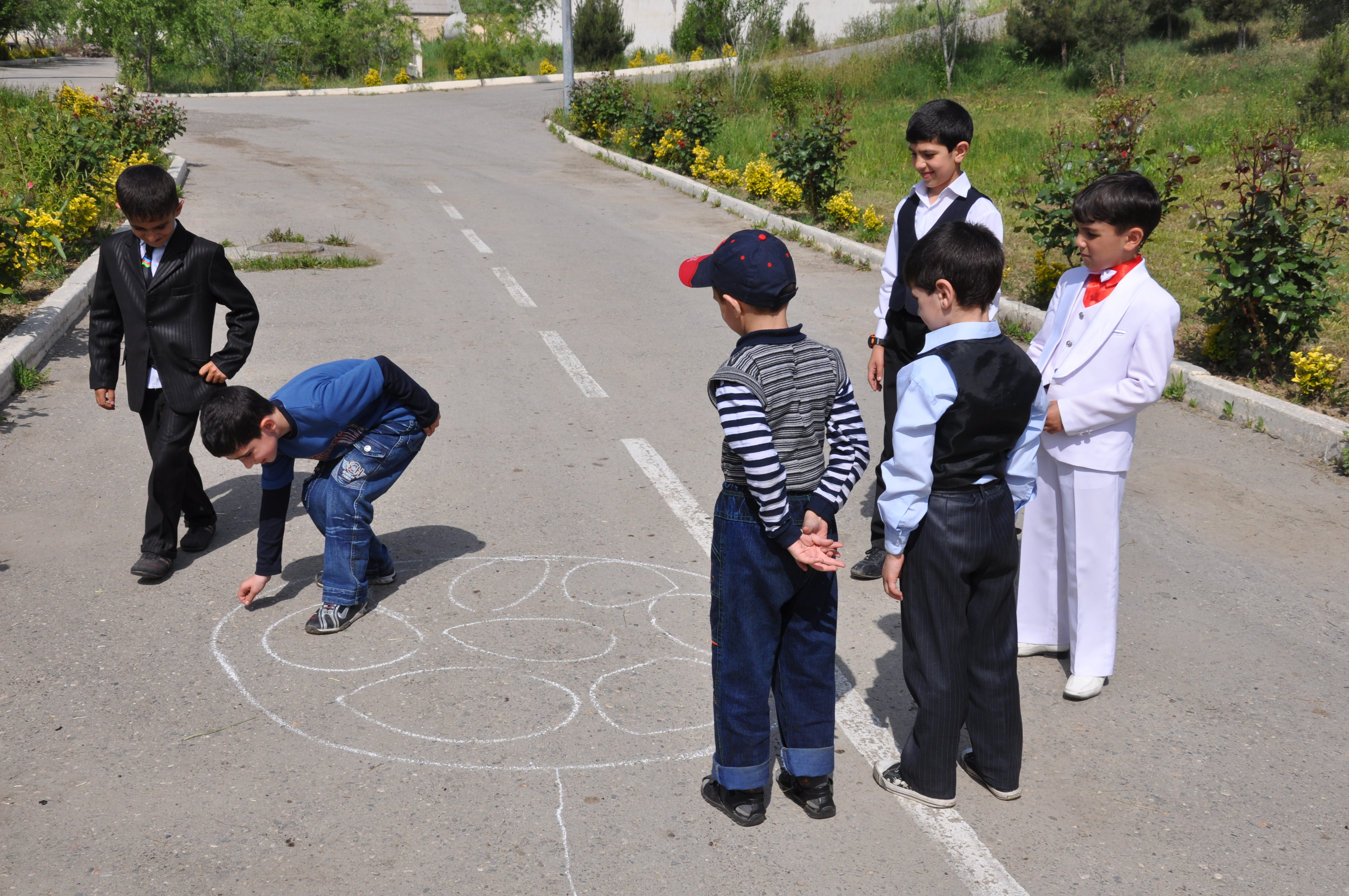 Yeddi daş — Azərbaycanda əsasən yazqabağı (bayramqabağı) günlərdə, eləcə də digər fəsillərdə uşaq və gənclər arasında geniş şəkildə oynanılan qədim oyunlarından biridir.